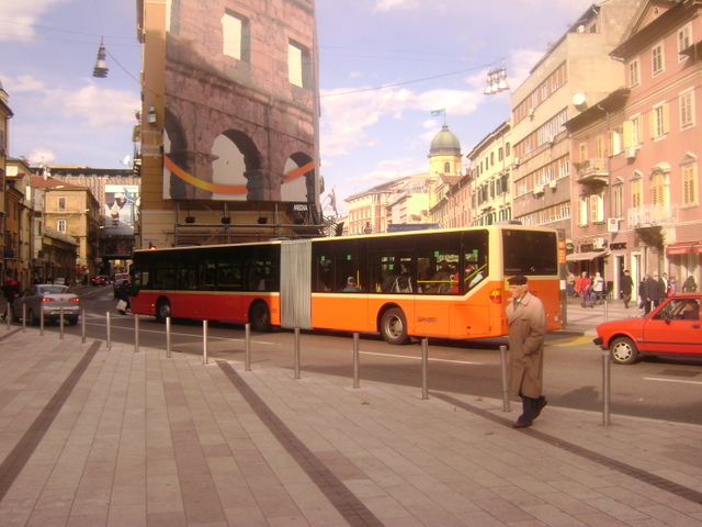 Zglobni autobus Autotroleja marke MB Citaro